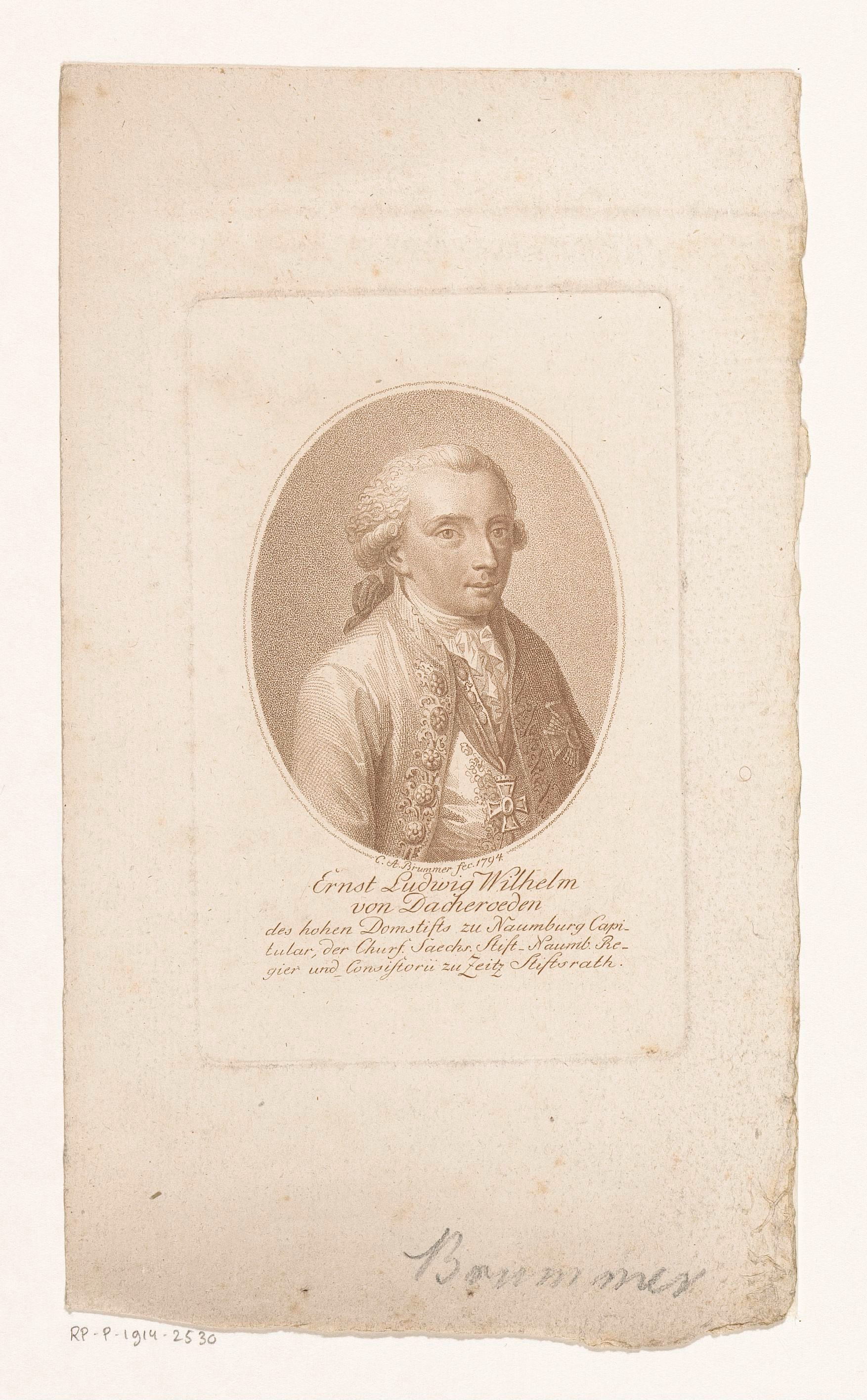 IdentificatieTitel(s): Portret van Ernst Ludwig Wilhelm, Freiherr von DacherödenObjecttype: prent Objectnummer: RP-P-1914-2530Catalogusreferentie: HAB A 4232Opschriften / Merken: verzamelaarsmerk, verso, gestempeld: Lugt 2228VervaardigingVervaardiger: prentmaker: Karl August Brummer (vermeld op object)Plaats vervaardiging: DresdenDatering: 1794Fysieke kenmerken: stippelwerk in bruinMateriaal: papier Techniek: stippelwerkAfmetingen: plaatrand: h 122 mm × b 78 mmOnderwerpWat: historical personsknighthood orderWie: Ernst Ludwig Wilhelm Freiherr von DacherödenVerwerving en rechtenVerwerving: aankoop 1905Copyright: Publiek domein